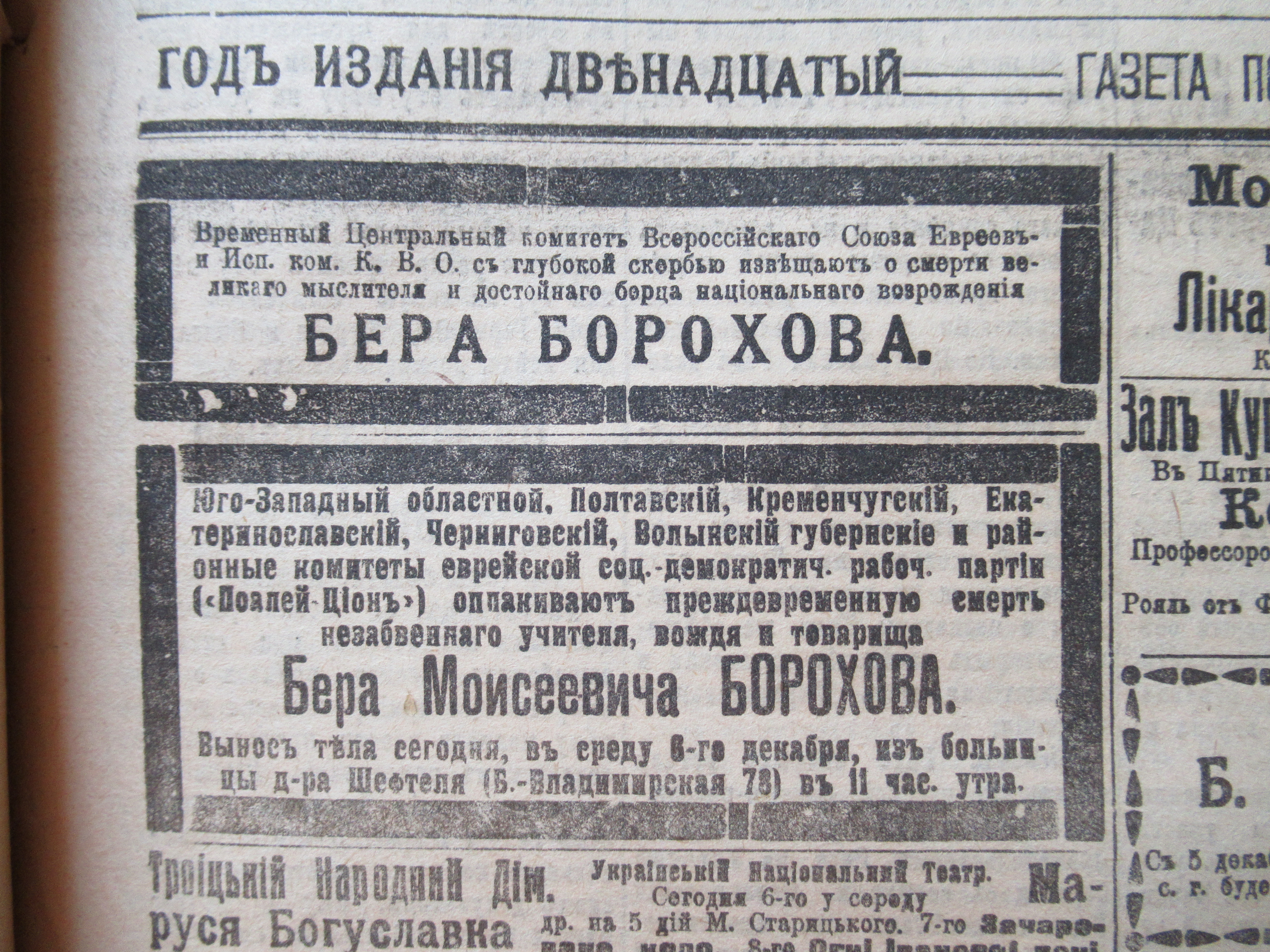 Некролог Бера Борохова в газете «Последнія новости. Киев. Утреннія» № 4814 за 6 декабря (ст. ст.) 1917 года